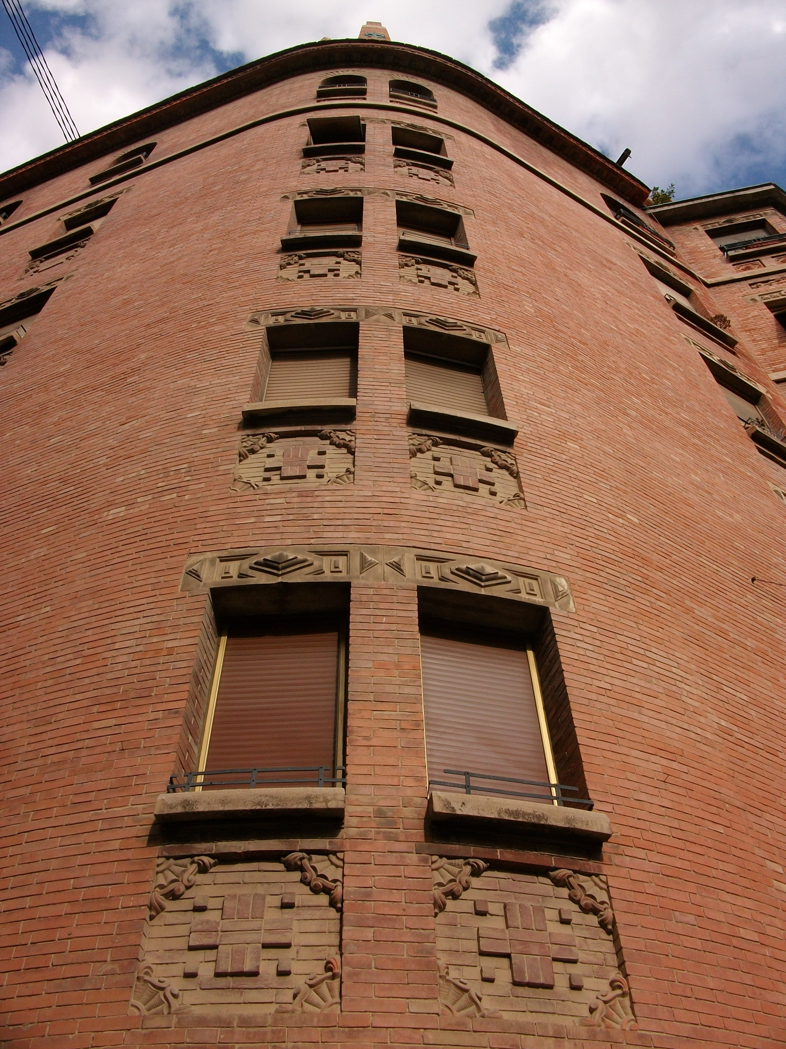 Finca Roja de València.